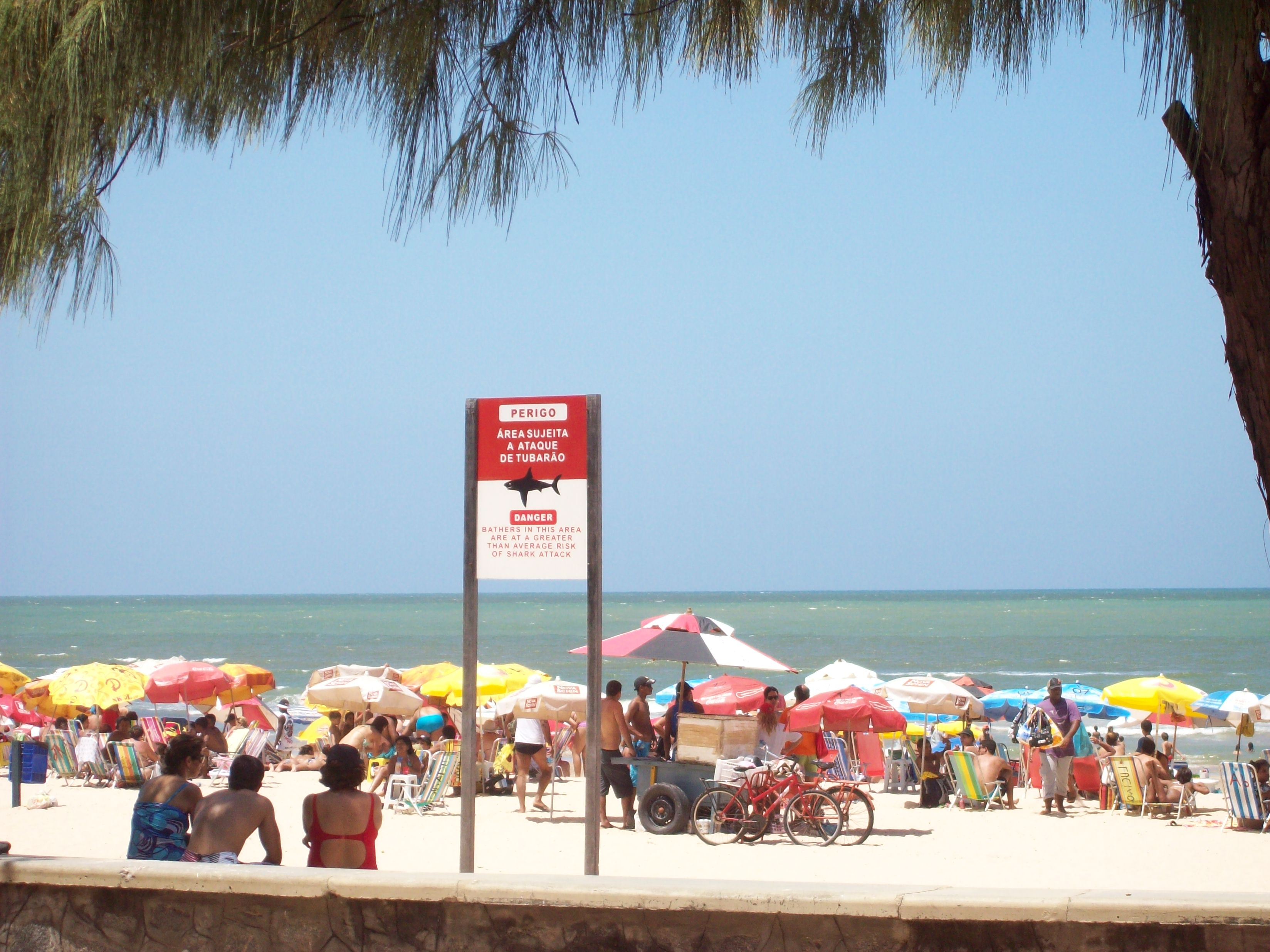 Advertência ataque de tubarões